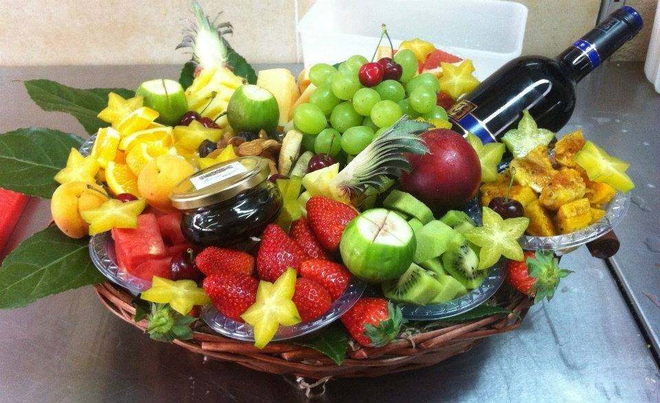 סלסלת פירות